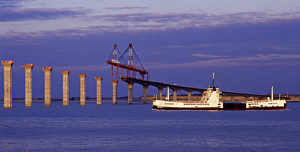 Bacs de l'Île de Ré. Le bac Maréchal de Thoiras devant le pont de l'Île de Ré en construction (11/1987) Photo issue de ma banque d'images personnelle Pep.per 3 mars 2006 à 14:25 (CET)